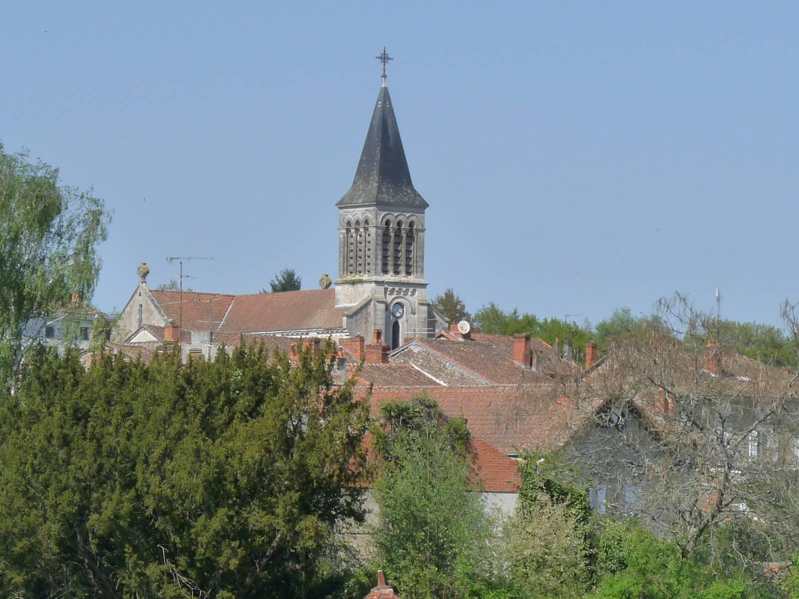 église Saint-Sébastien, Chabanais, Charente, France